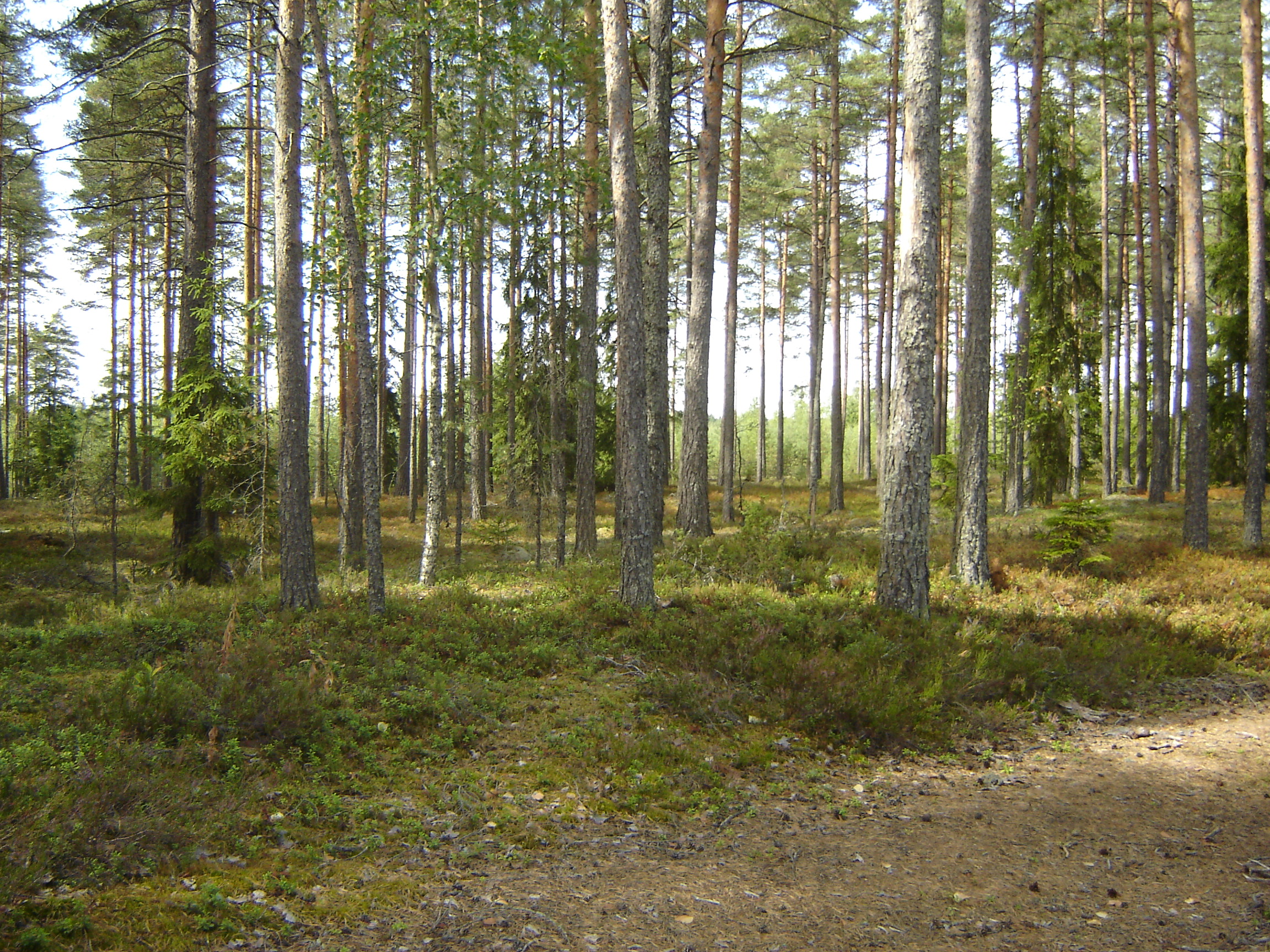 Huhtamon soraharjua